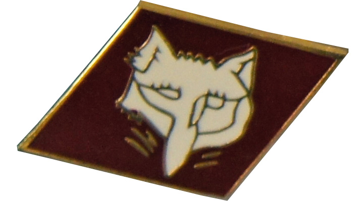 Musée de l'aéronautique Bétheny, SPA_84_Renard_ec_130_Valois .